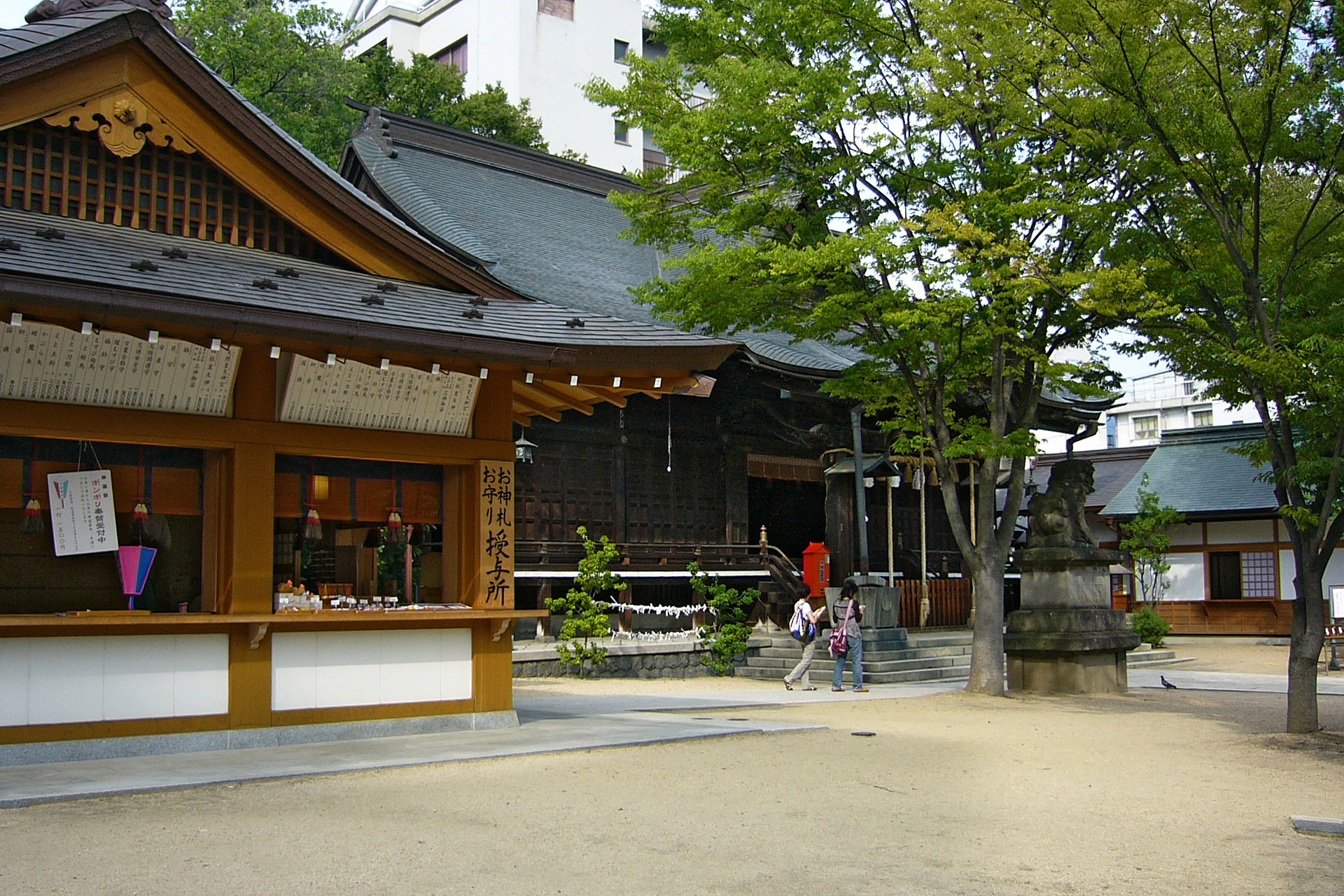 Yohashira-jinja in Matsumoto, Nagano, Japan